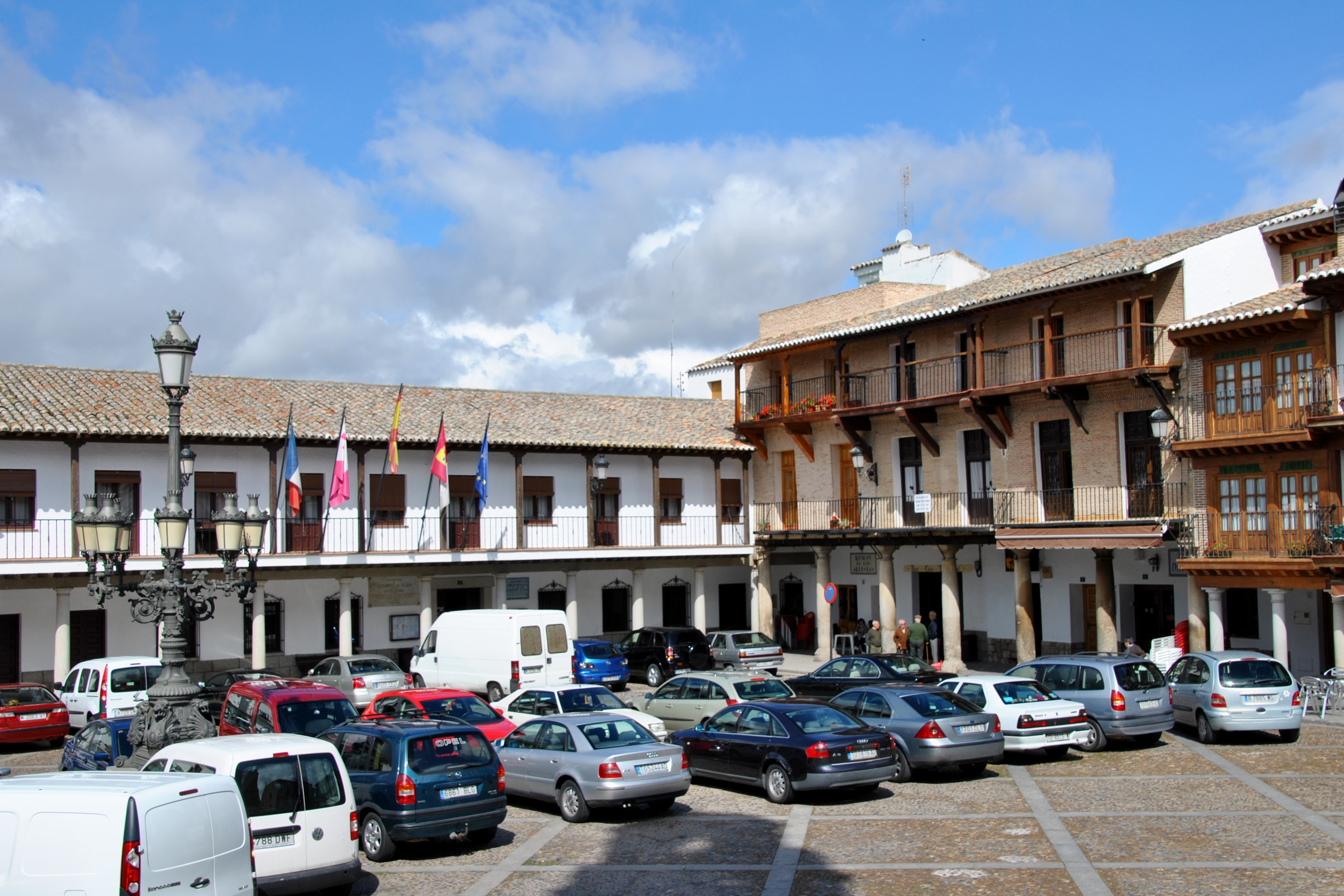 Plaza Mayor de La Puebla de Montalbán - Toledo - Spain